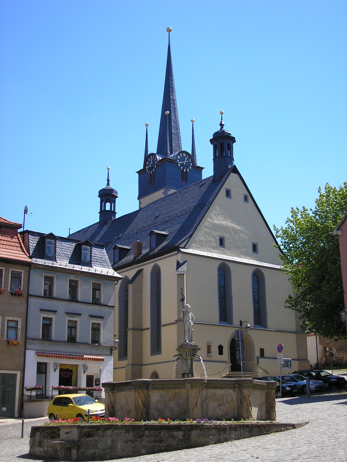 Markt und Stadtkirche in Pößneck (Thüringen).